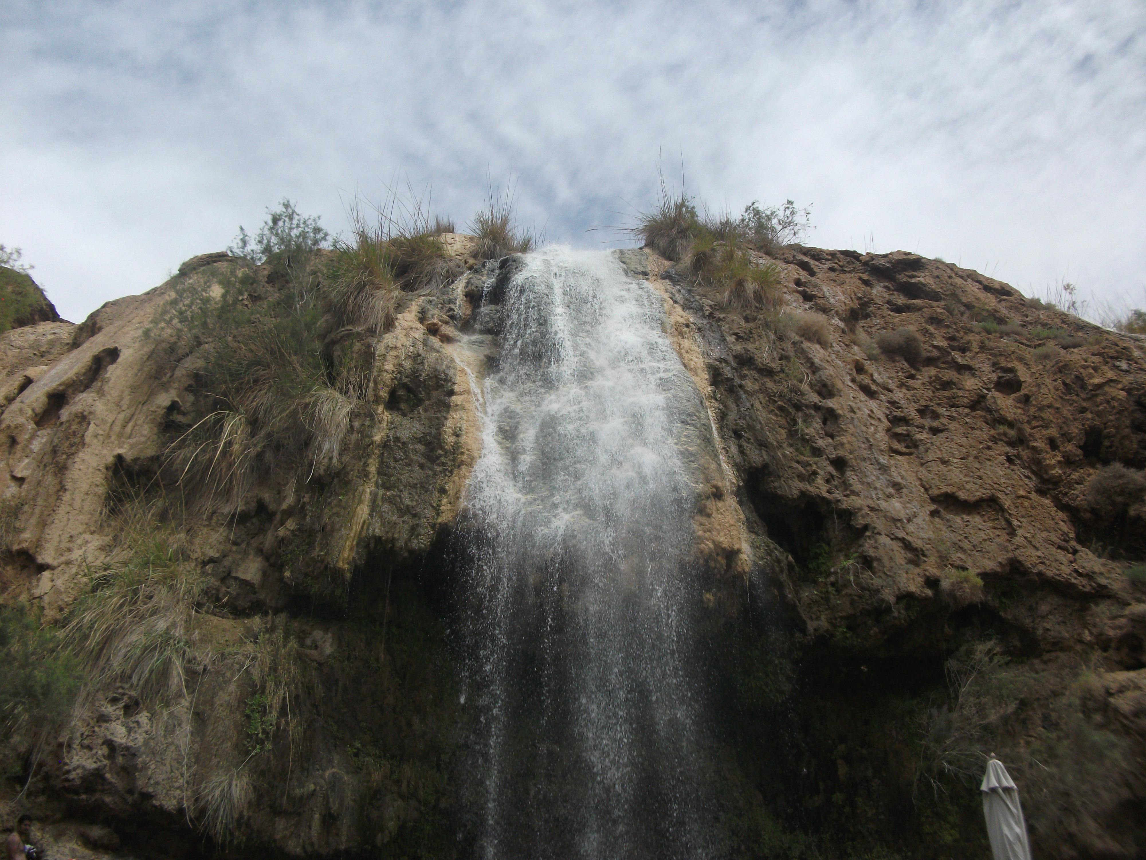 ماعين محافظة مأدبا